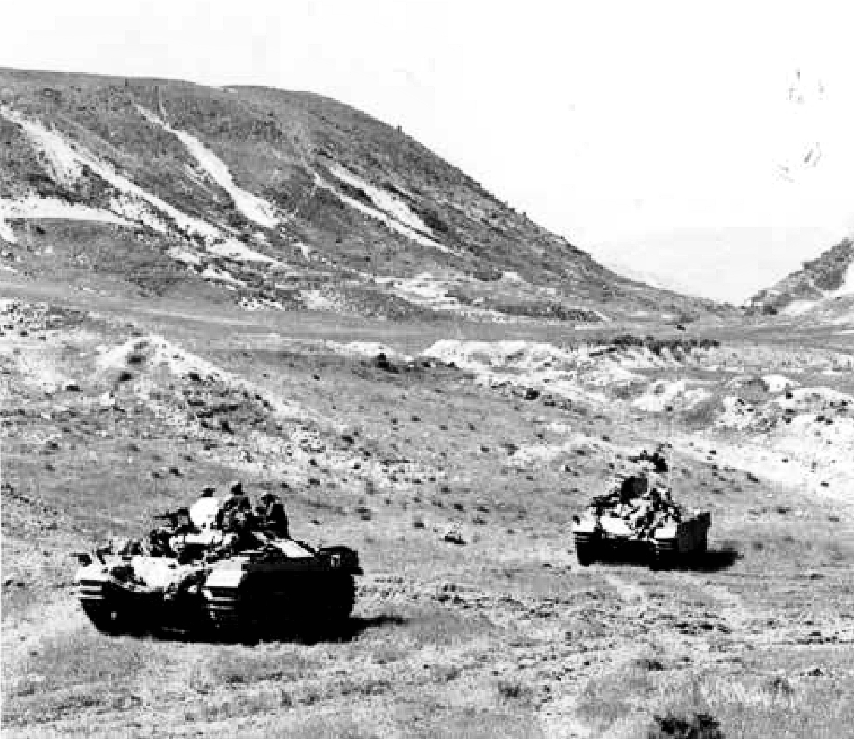 מבצע חוק וסדר. כוח גל הירש במידון. פלוגת החה"ן בפיקוד רס"ן רוני אלשיך וסרן גל הירש טיהרה את השכונה הצפון-מערבית ואת תעלות הקשר והשמידה בונקרים ועמדות מחבלים.